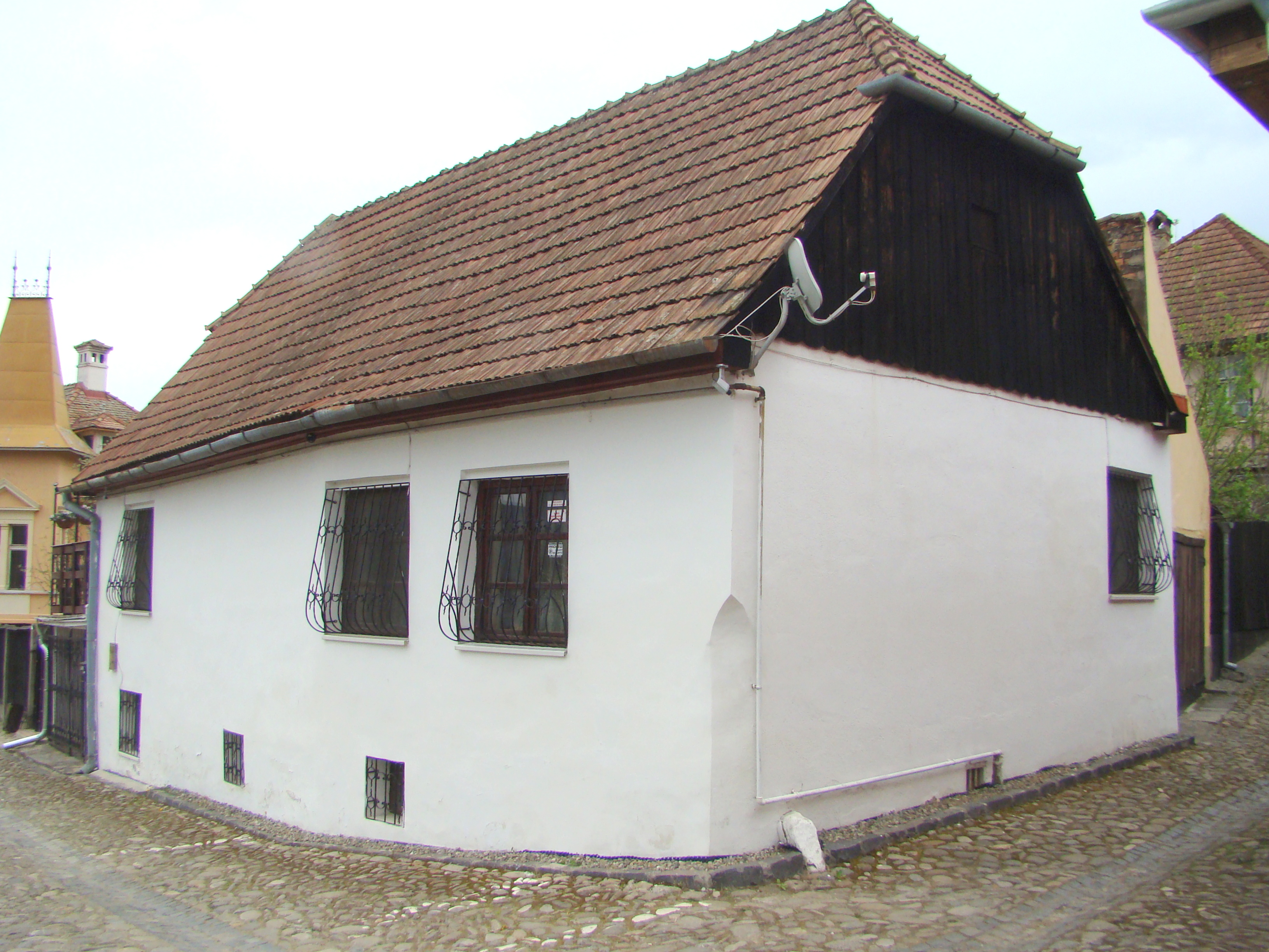 Casă, municipiul Sighișoara, str. Zidul Cetății 9 sf. sec. XVIII, modif. sec. XX